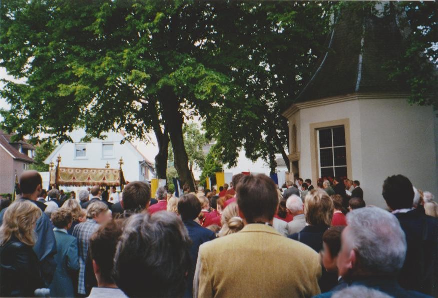 Letzte Fronleichnamsprozession (bis auf "ausnahmsweise" im Jahr 2005) an der Aloysiuskapelle in Steinfurt-Borghorst, NRW, Germany. Ab 2003 wurde der Weg geändert und die Kapelle war danach nur noch 2005 einmalig Segensstation. Gescanntes Analogfoto.